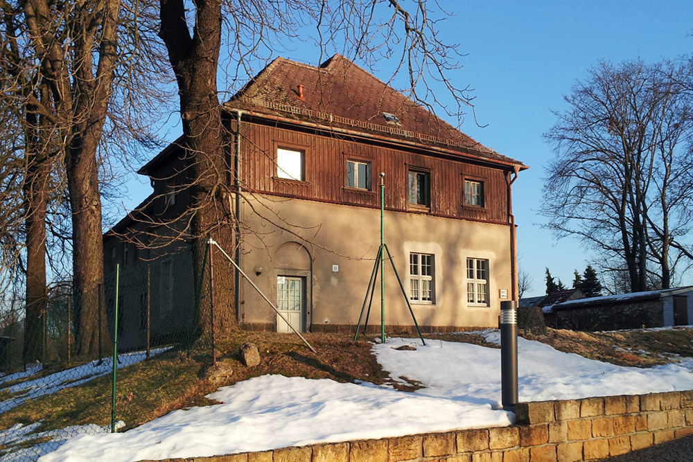 Denkmalgeschütztes Gebäude in Radeberg, der sogenannte "Spatzenhof" auf dem Gelände der Villa Storchennest